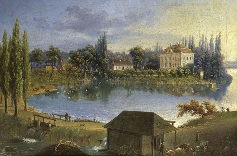 Zamek w Piskach (woj. Lubelskie)